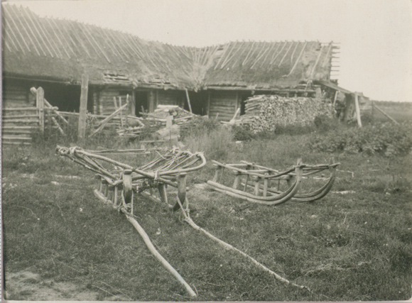 Heinaveo regi